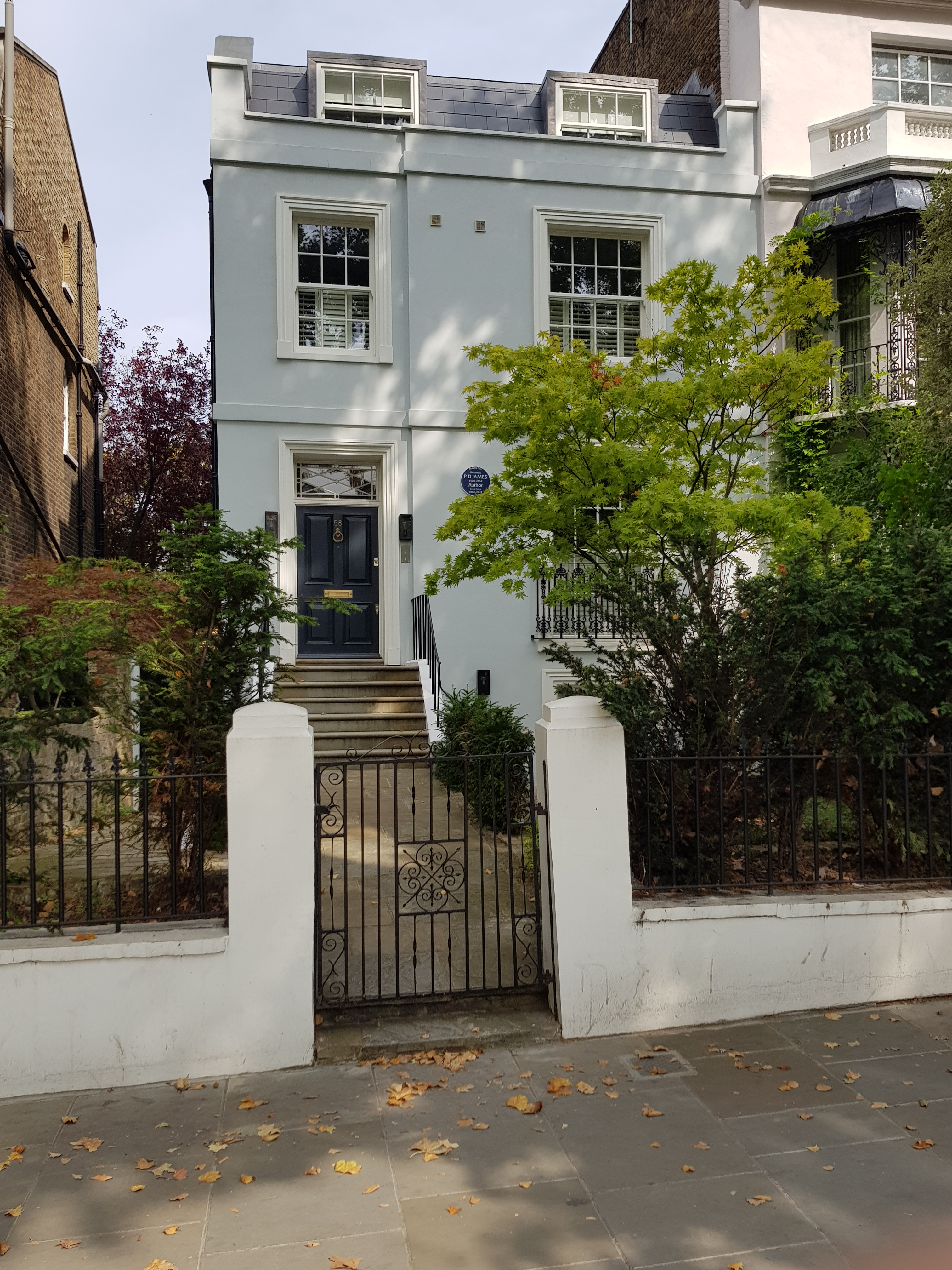 58 Holland Park Avenue, Londres. La romancière P.D. james a vécu à cette adresse de 1984 à 2012.